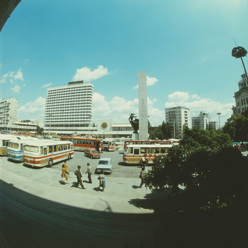 Chisinau (1980).